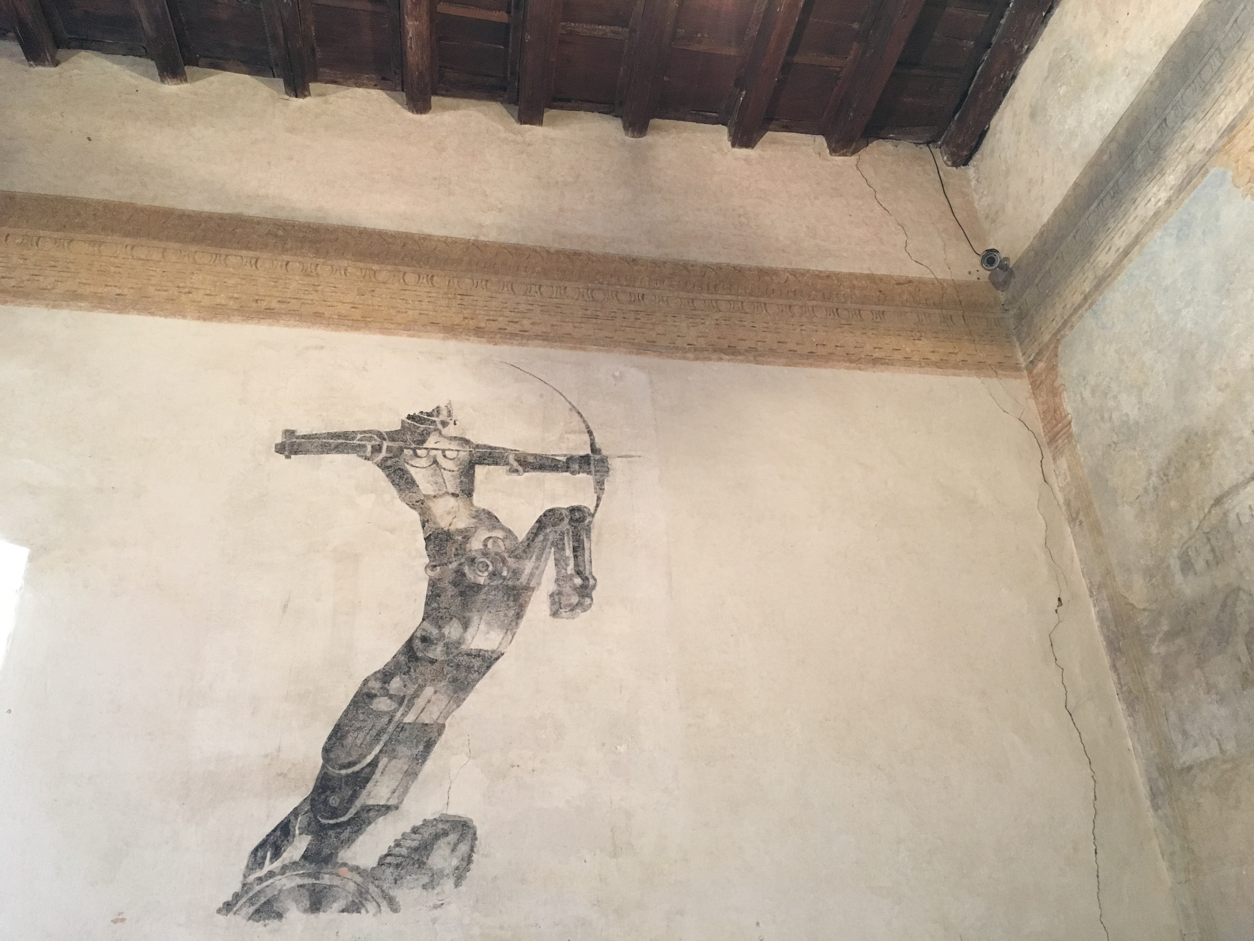 Gessetto futurista situato nella Sala dei Giganti, all'interno della Rocca di Bentivoglio